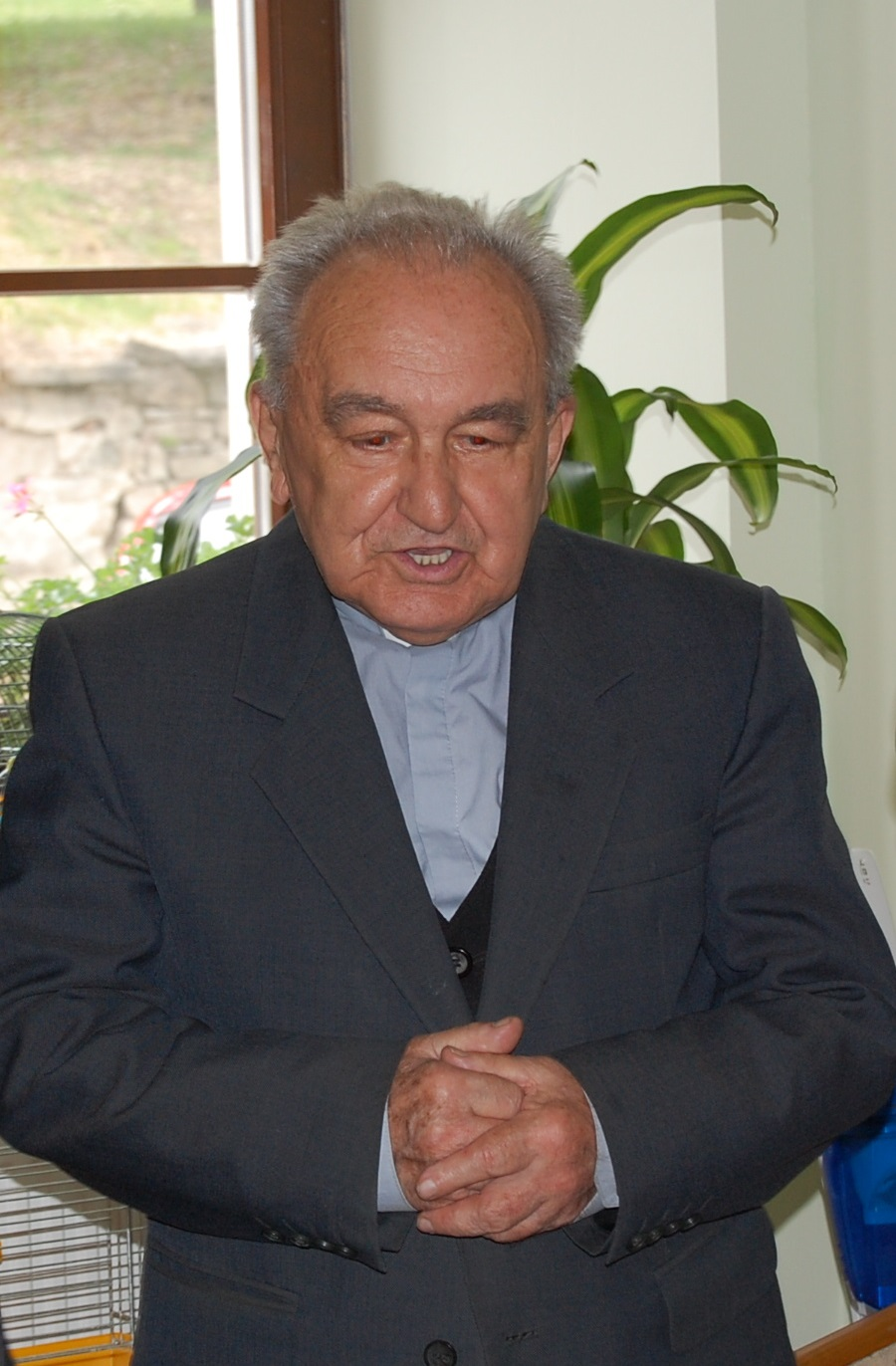 Tomáš Prnka (2012)